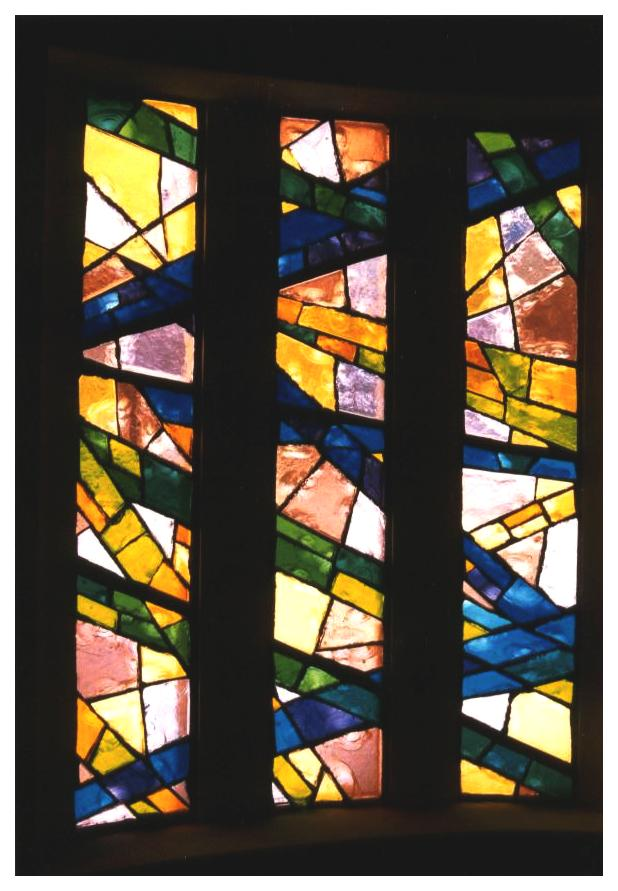 Carlo Roccella